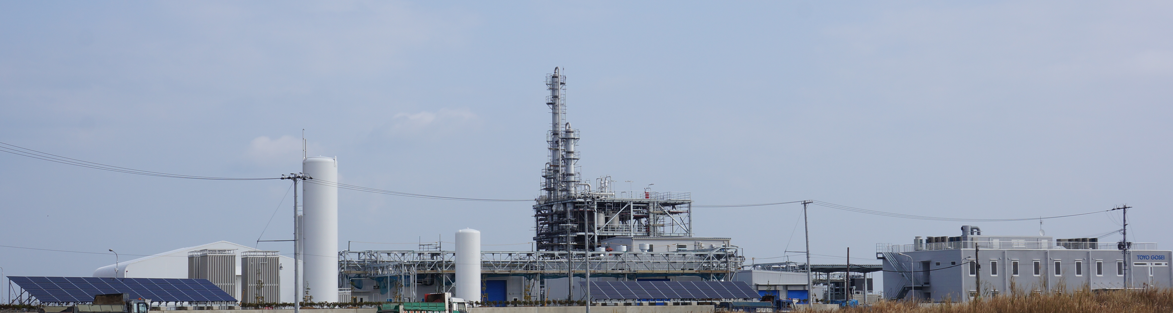 東洋合成工業淡路工場の建設途中風景